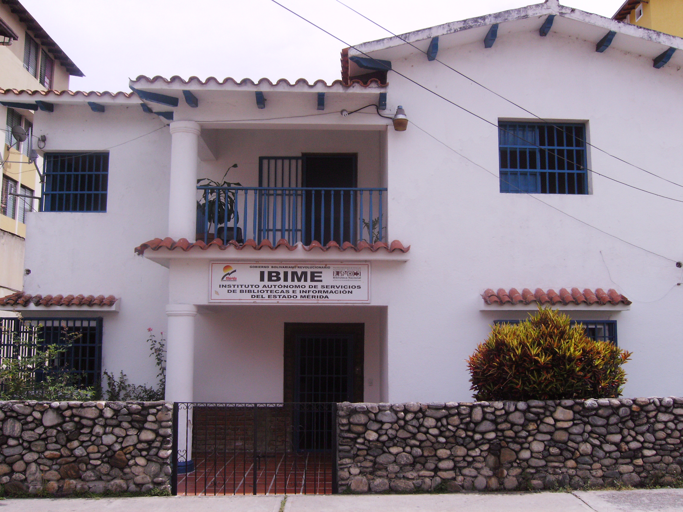 Vista esterna dell'Instituto Autónomo de Bibliotecas e Información del Estado Mérida (IBIME)